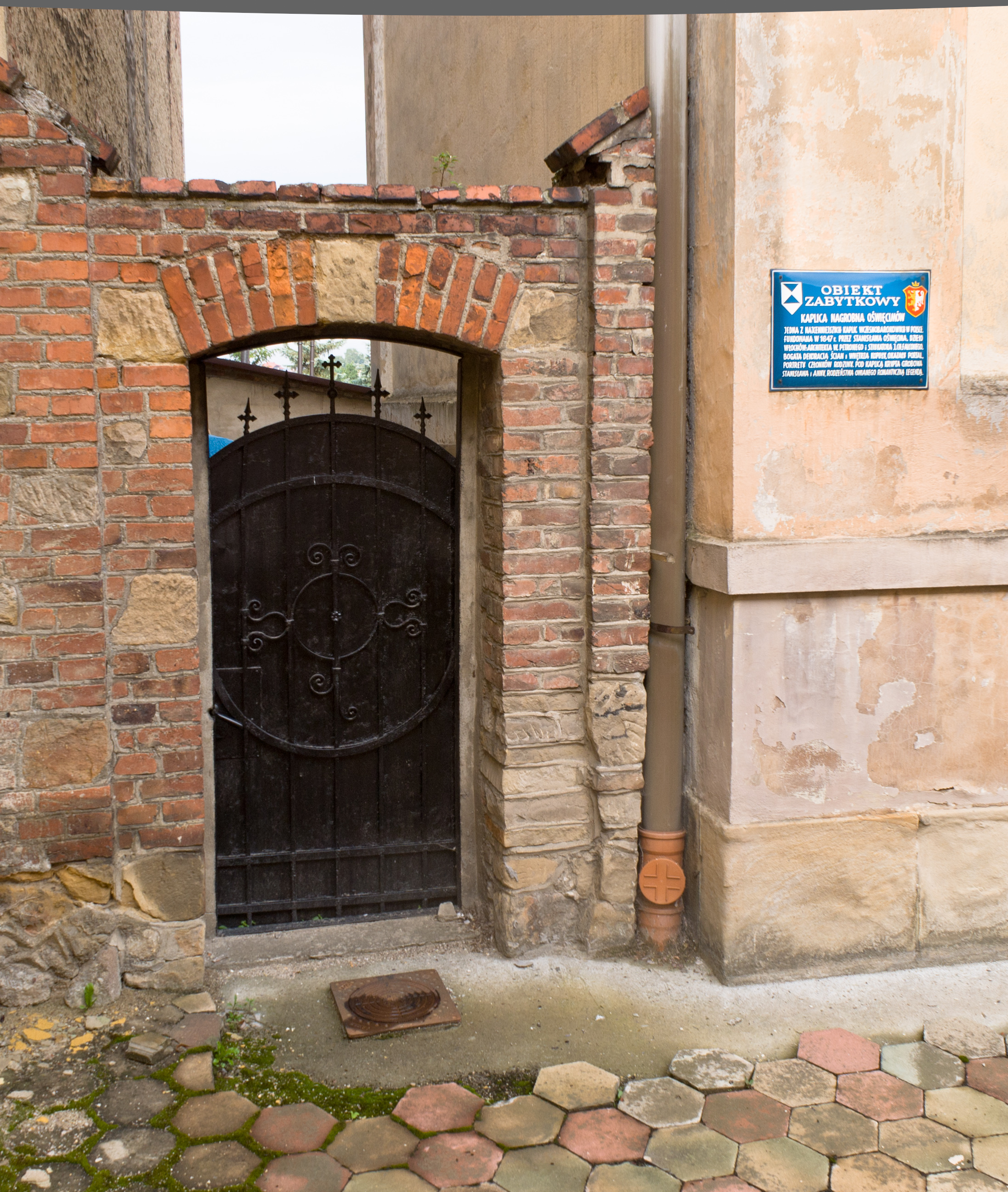 Kaplica nagrobna Oświęcimów przy kościele oo. Franciszkanów w Krośnie